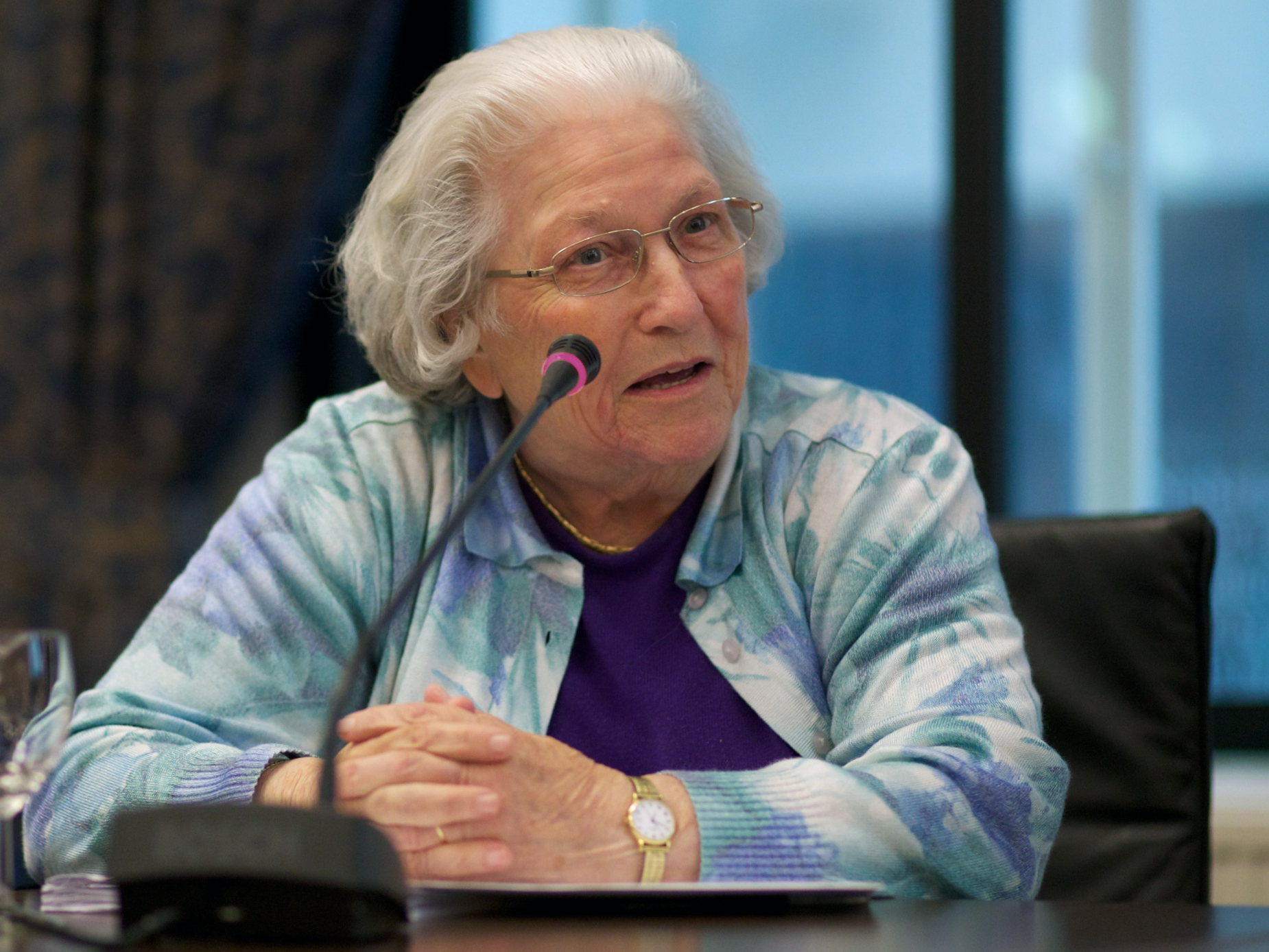 Hannie van Leeuwen bij Nationaal Archief & Spaarnestad Photo join Wikipedia